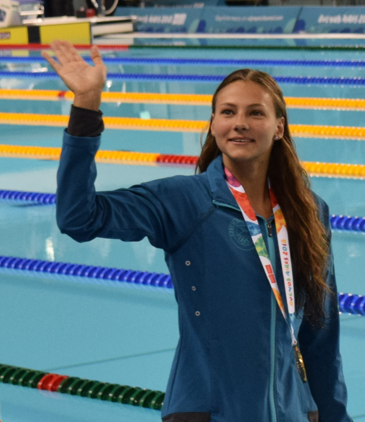 Finales de natación , durante los Juegos Olímpicos de la Juventud 2018 en Buenos Aires. Tarde del 10 de octubre. Junxuan YANG, Mayuka YAMAMOTO y Barbora SEEMANOVA.